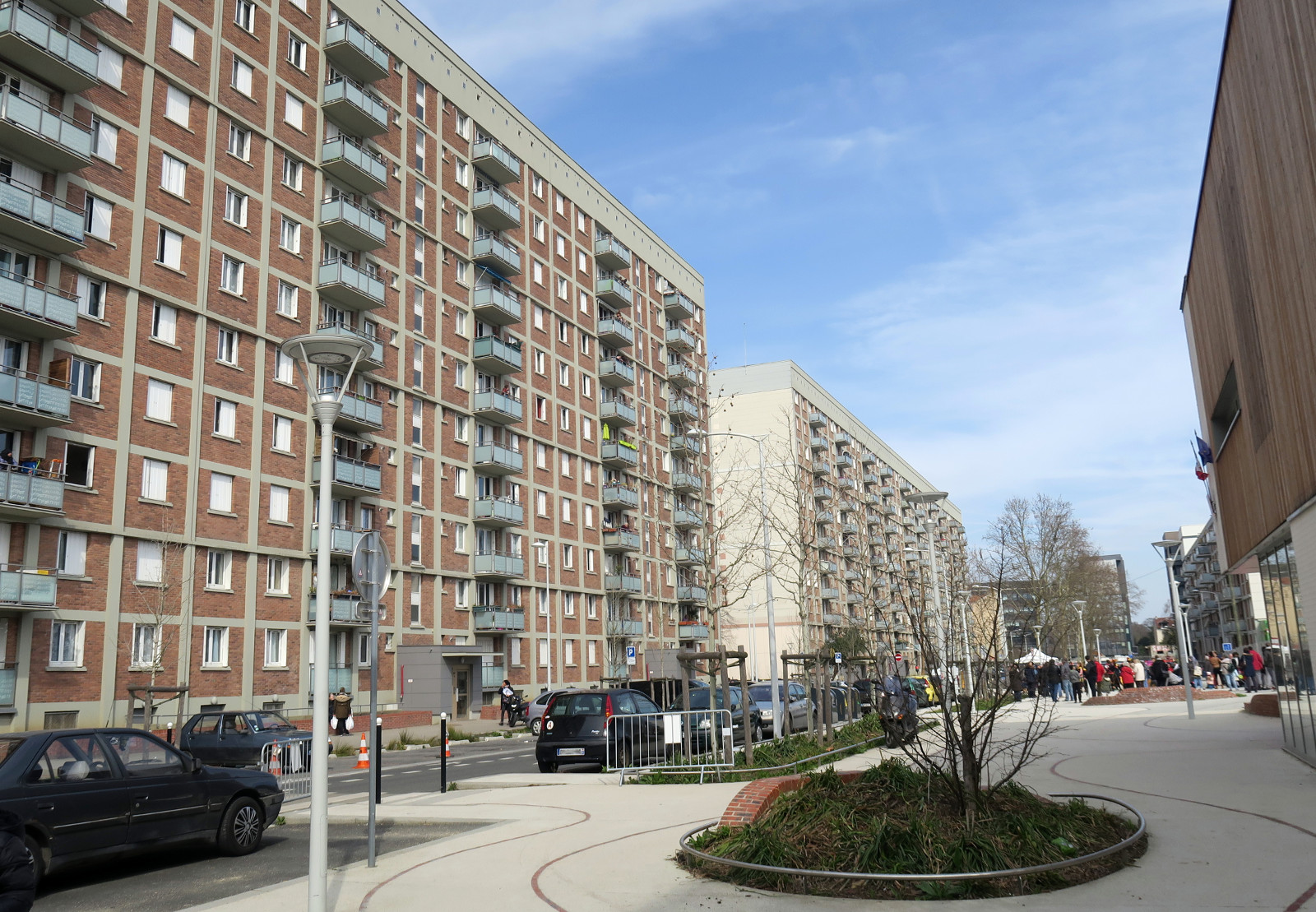 Barres HV et HW de la cité du Chaperon-Vert